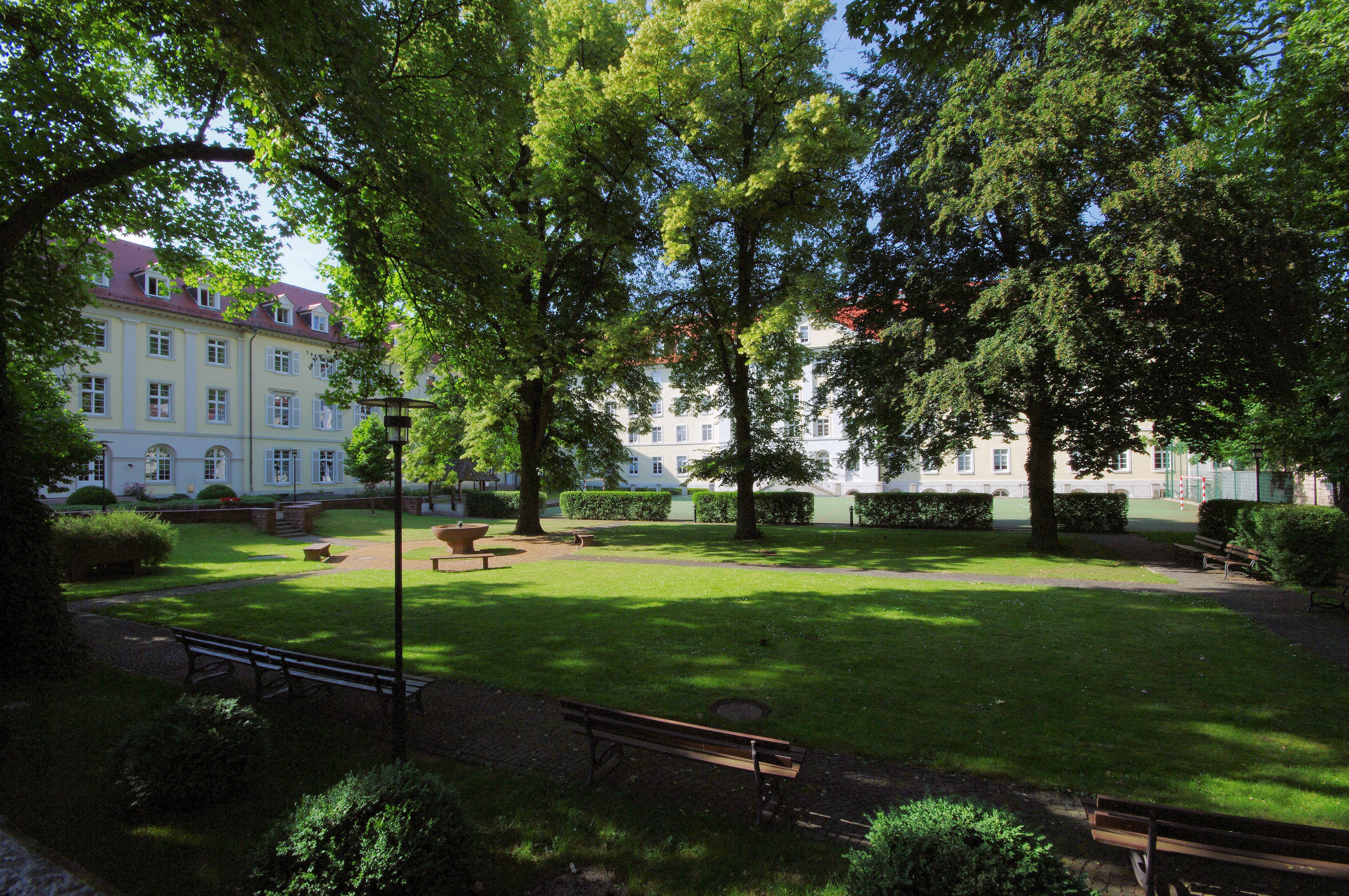 Das Collegium Borromaeum (CB, links) in Freiburg im Breisgau ist das Priesterseminar der Erzdiözese Freiburg, rechts das Amt für Kirchenmusik